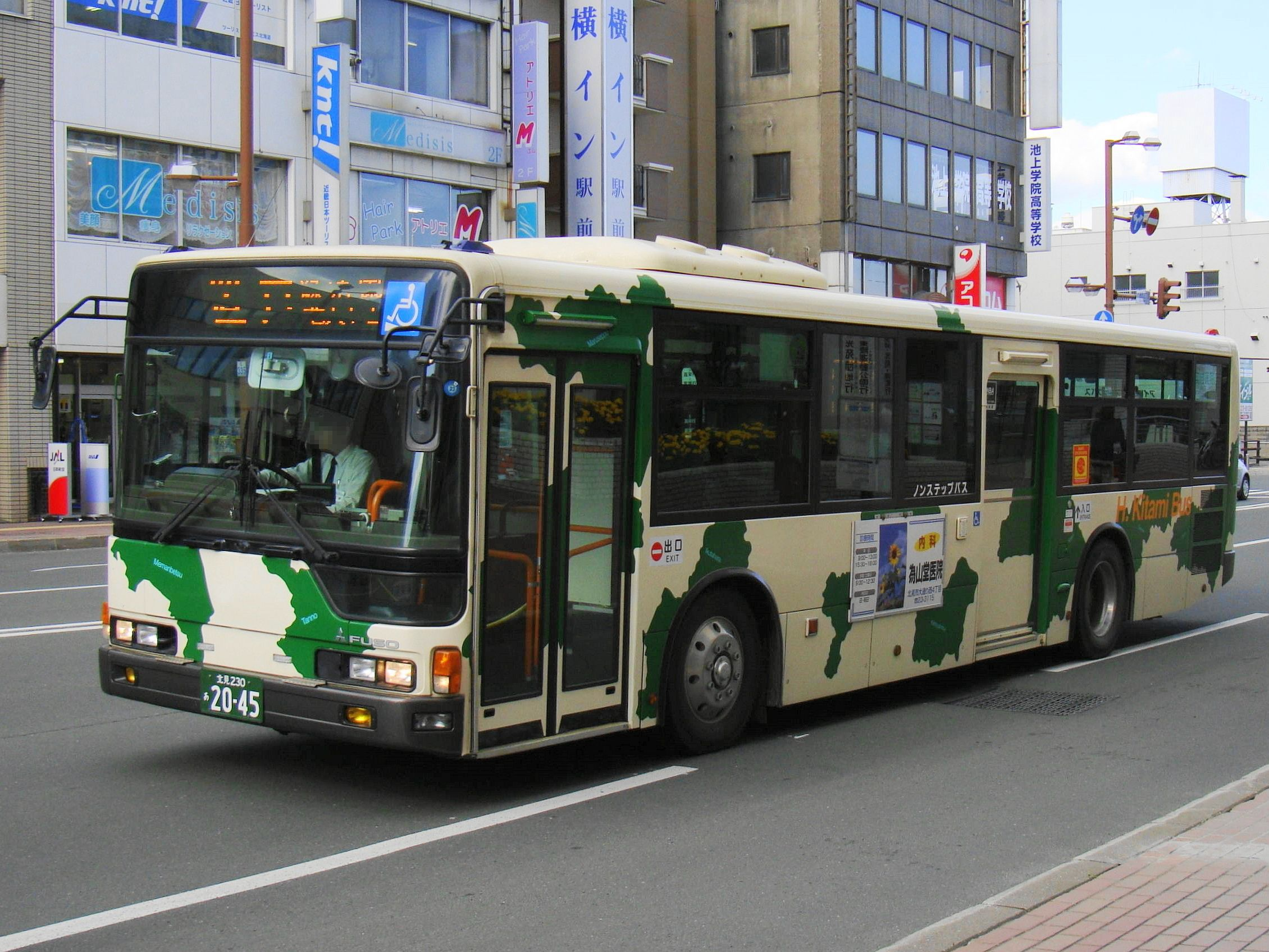 Kitami to Oketo